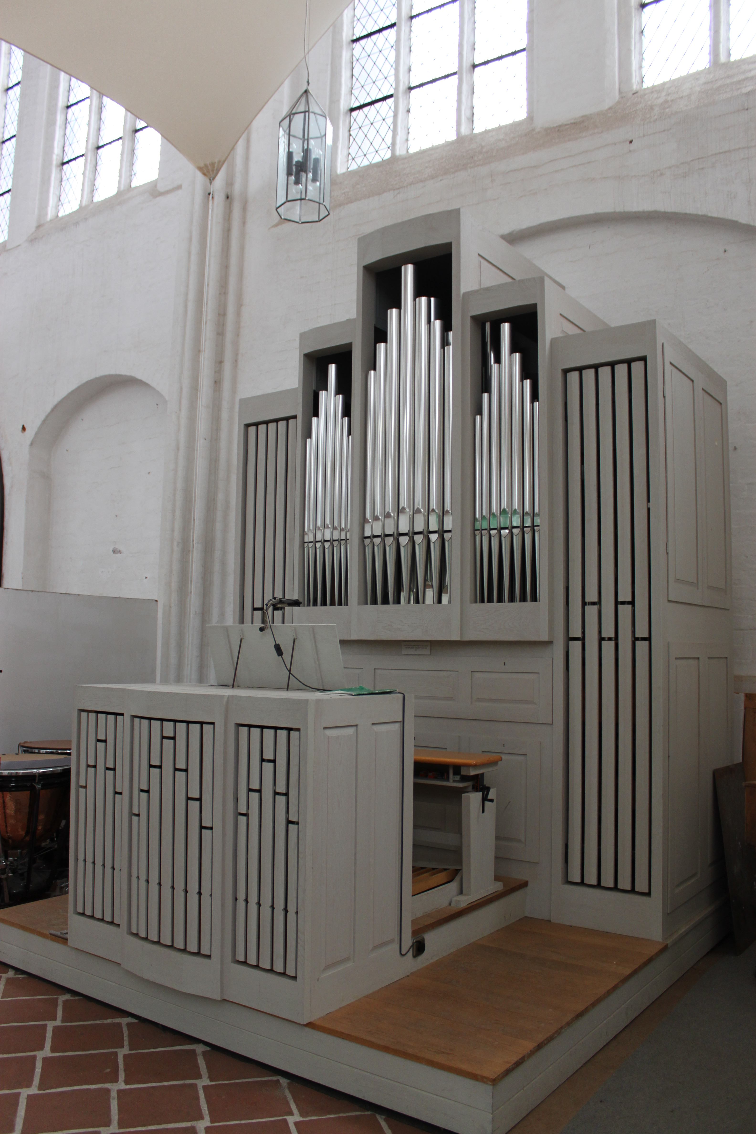 Orgel der Petrikirche in Lübeck, errichtet 1992 durch Hinrich Otto Paschen